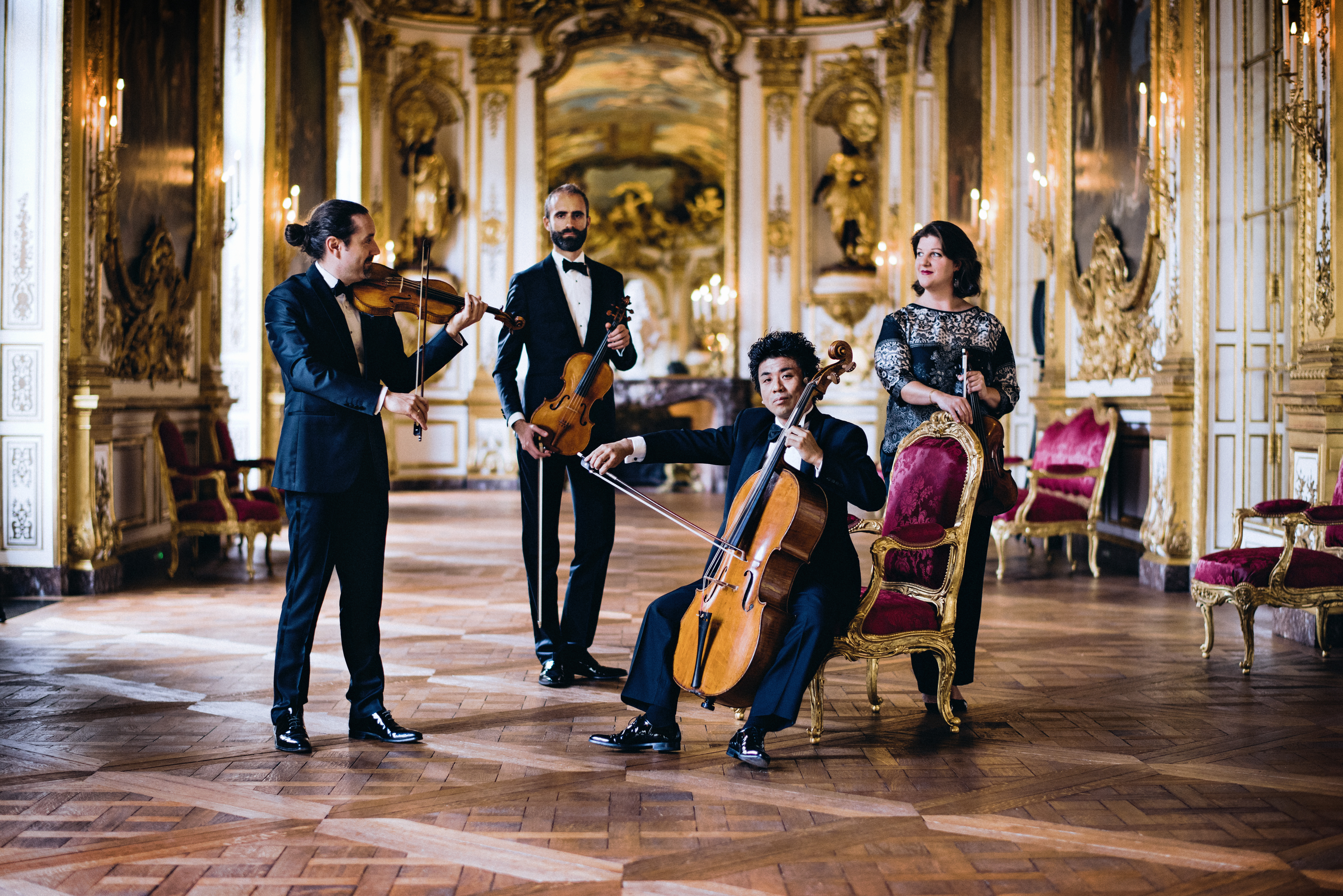 ©Franck Juery